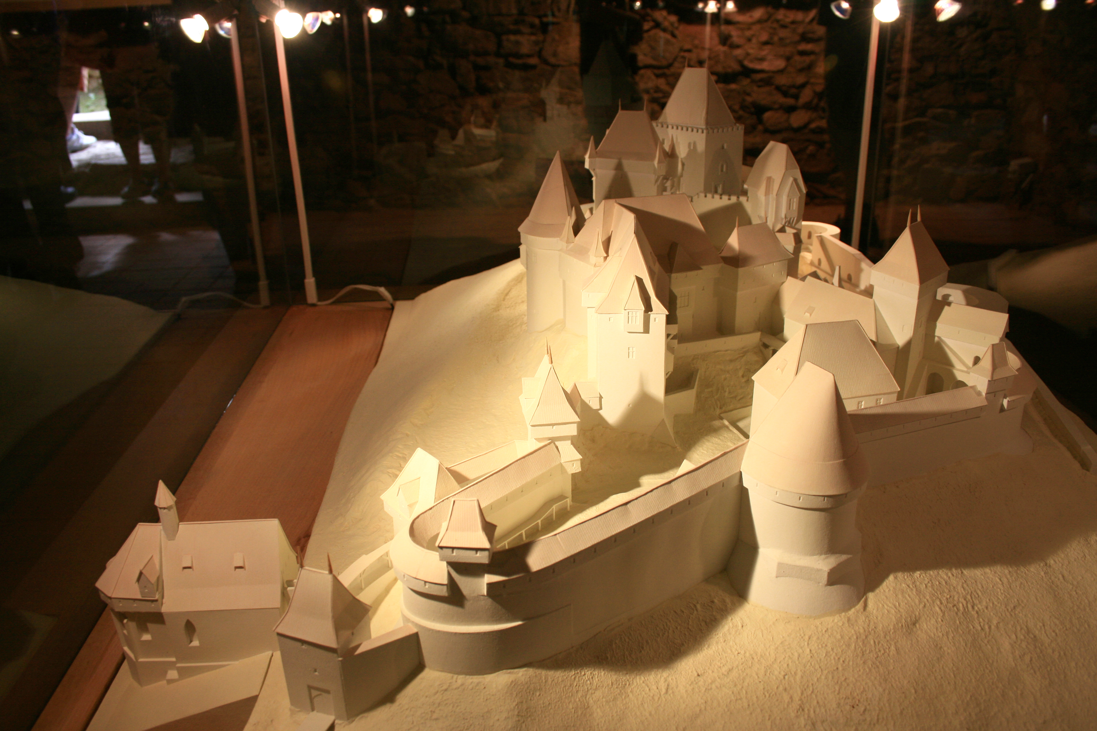 Hrad Rabí s hradním kostelem Nejsvětější Trojice, část stojící, část zřícenina a archeologické stopy (Rabí), na skalnatém výchozu kopce, Rabí